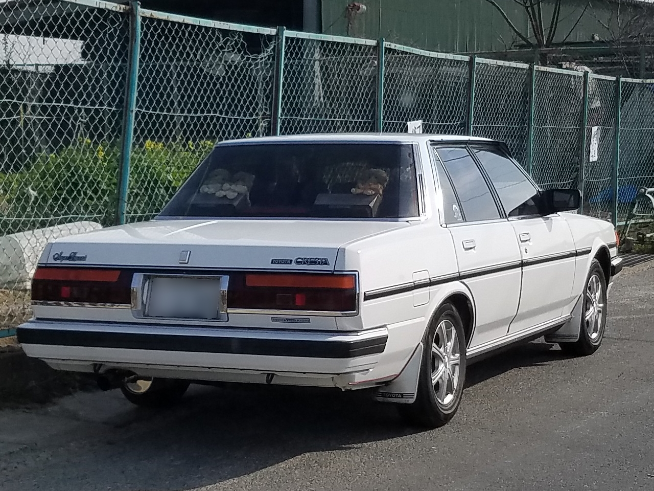 クレスタ スーパールーセント（前期型）